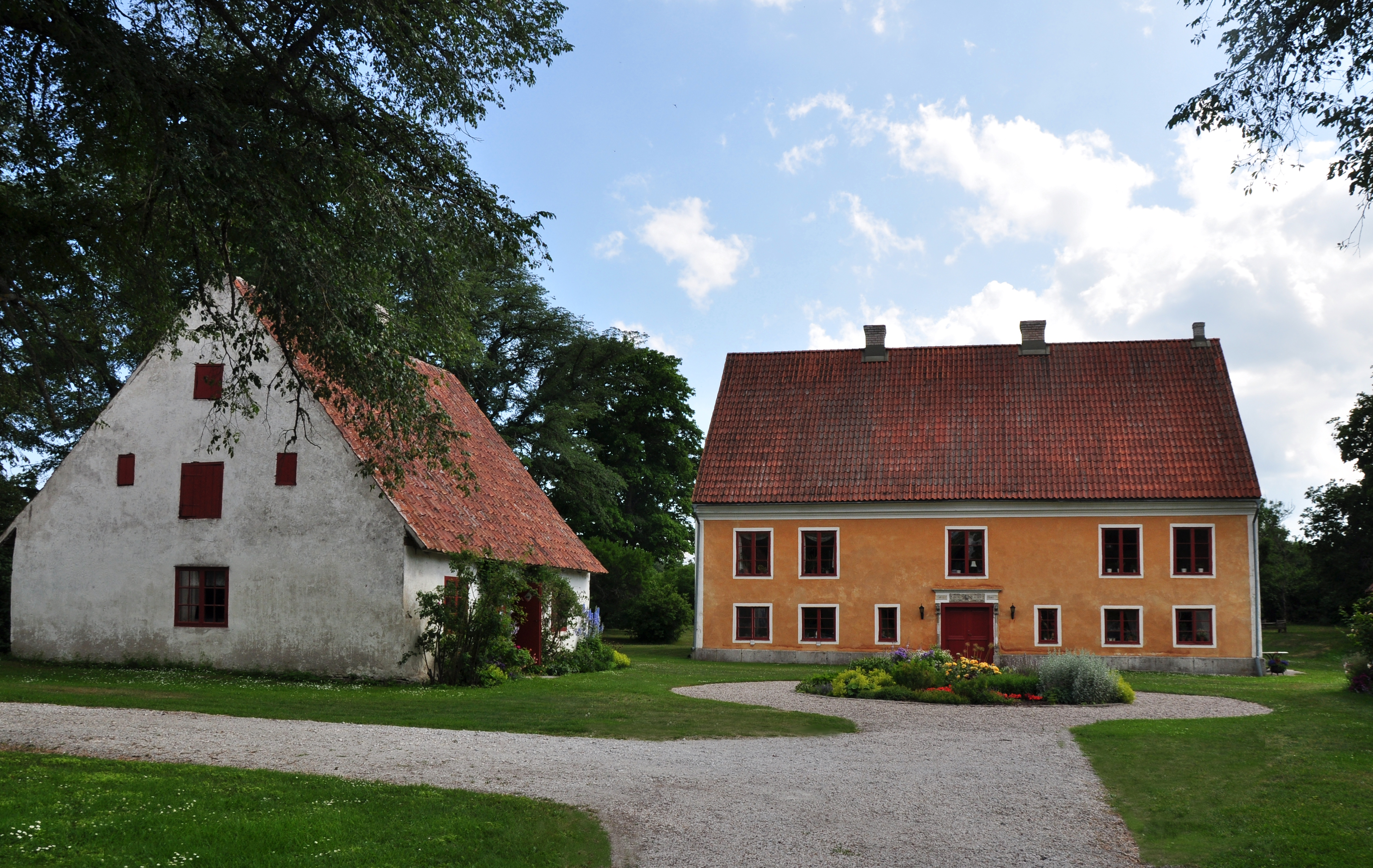 Pavalds gård, stenhus åt en kalkpatron, Lärbro, Gotland